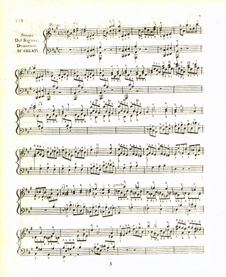 Première page de la sonate K. 113, de Domenico Scarlatti dans une édition du début de XIXe siècle publiée en France au sein de l'officielle Méthode de piano du Conservatoire par Louis Adam.